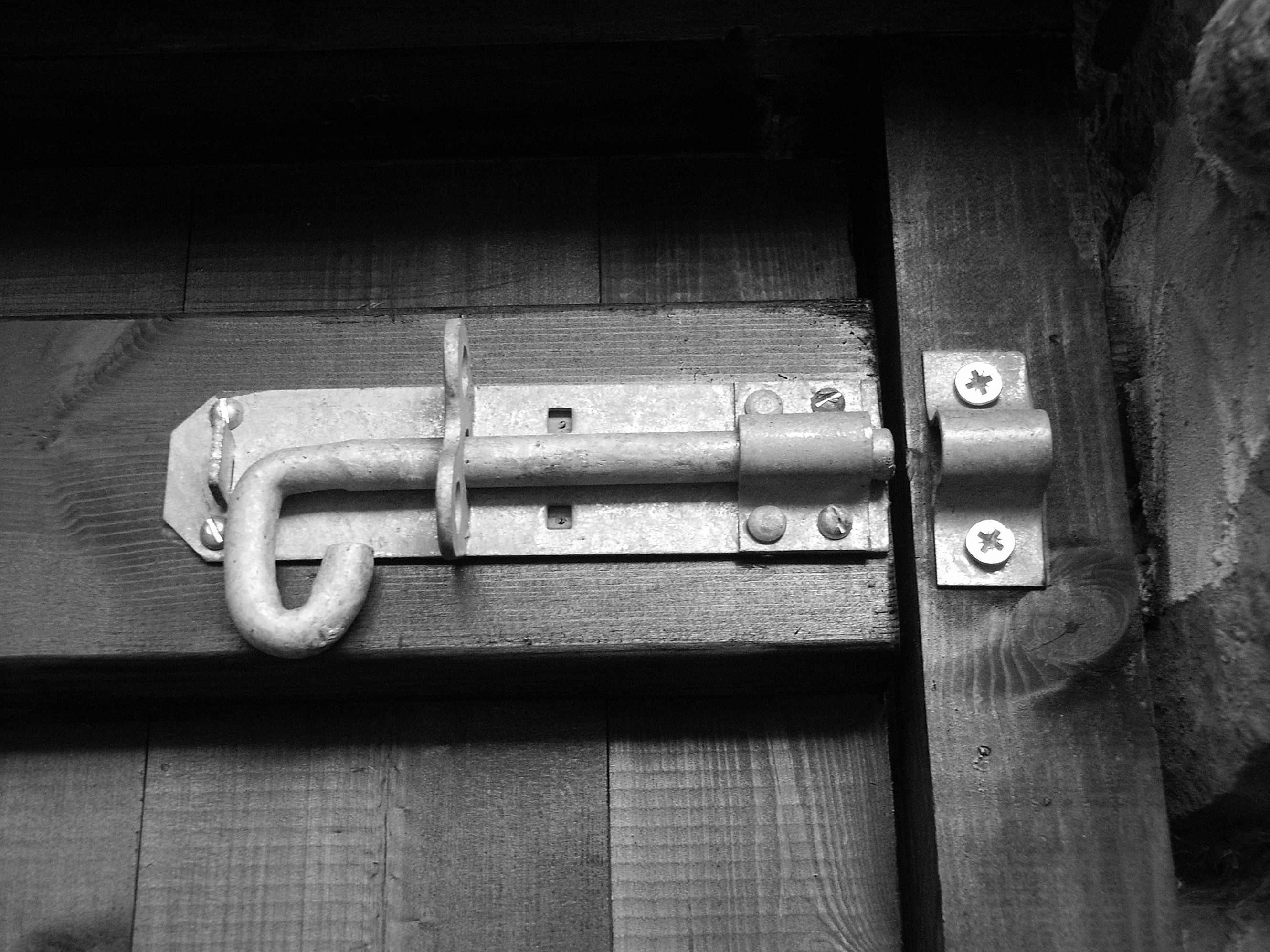 Шпингалет